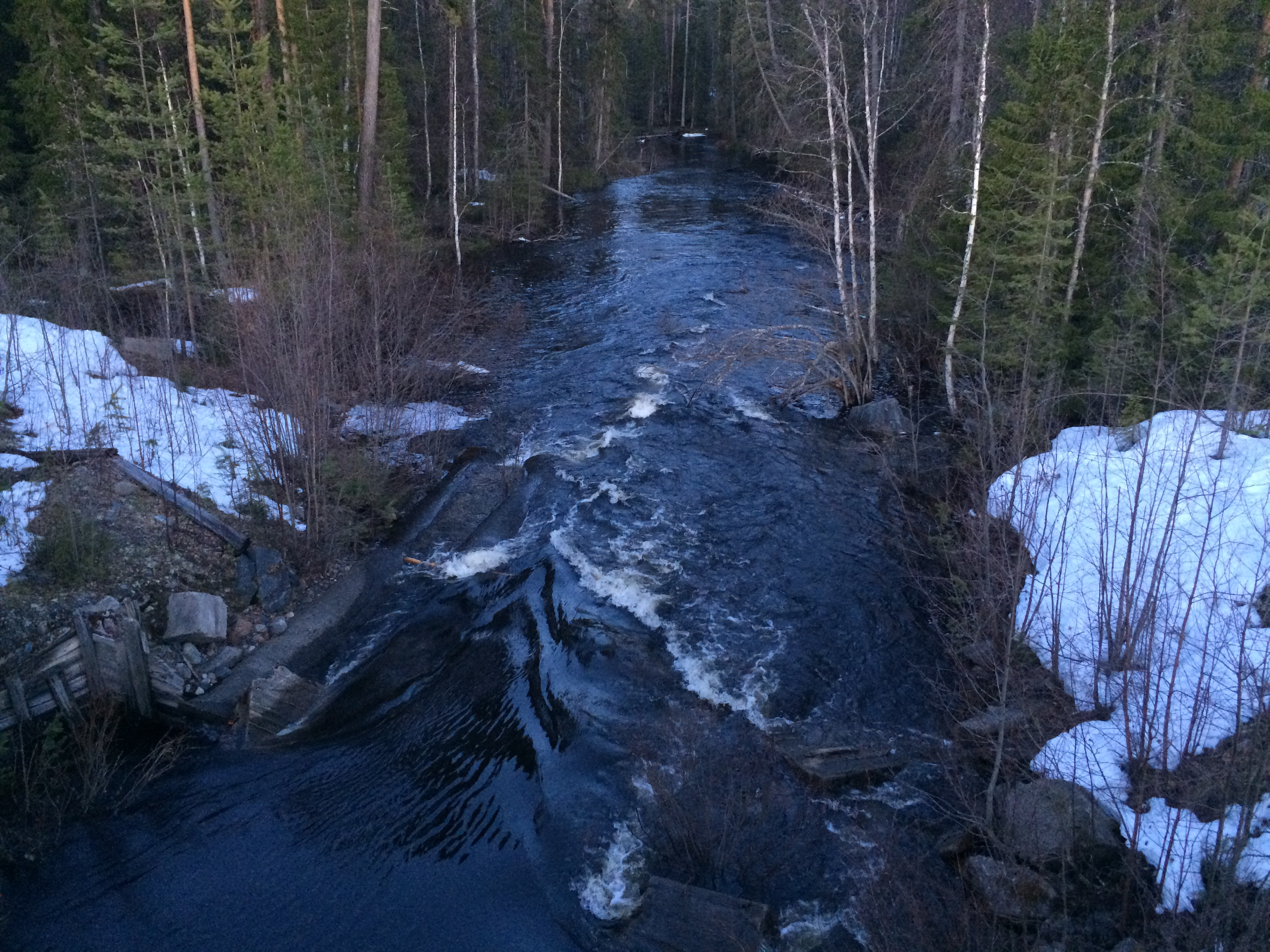 Луаштанги